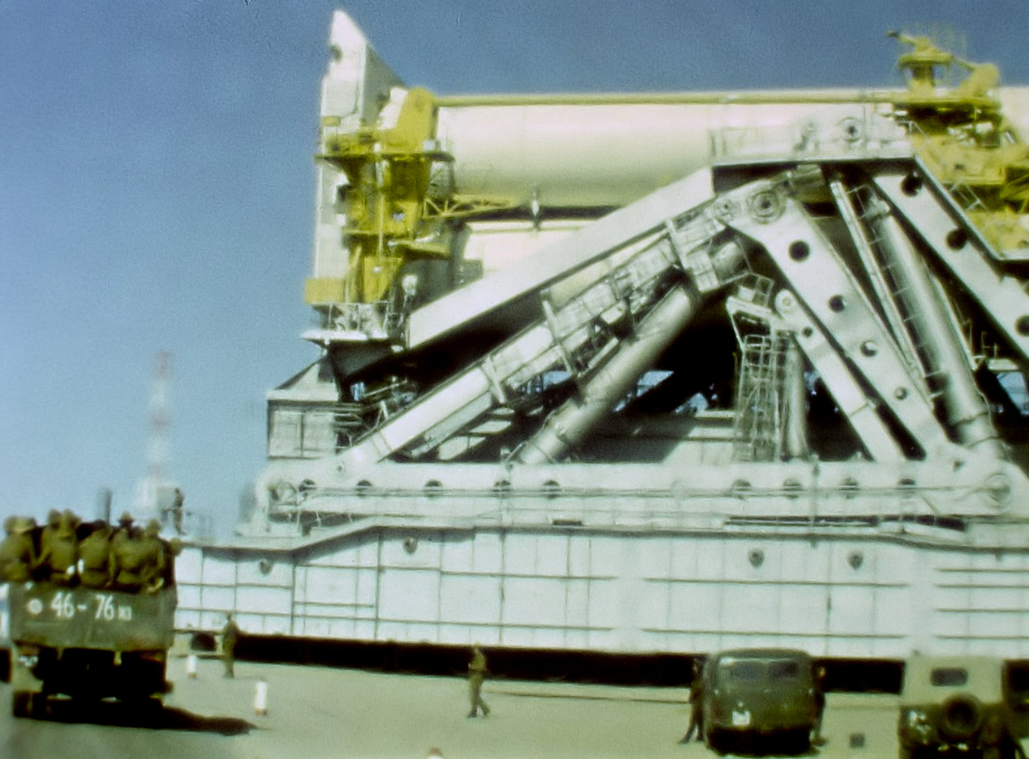 Транспортёр вывозит ракету-носитель «Энергия» на стартовый комплекс. Кадр из кинофильма собственной съёмки.